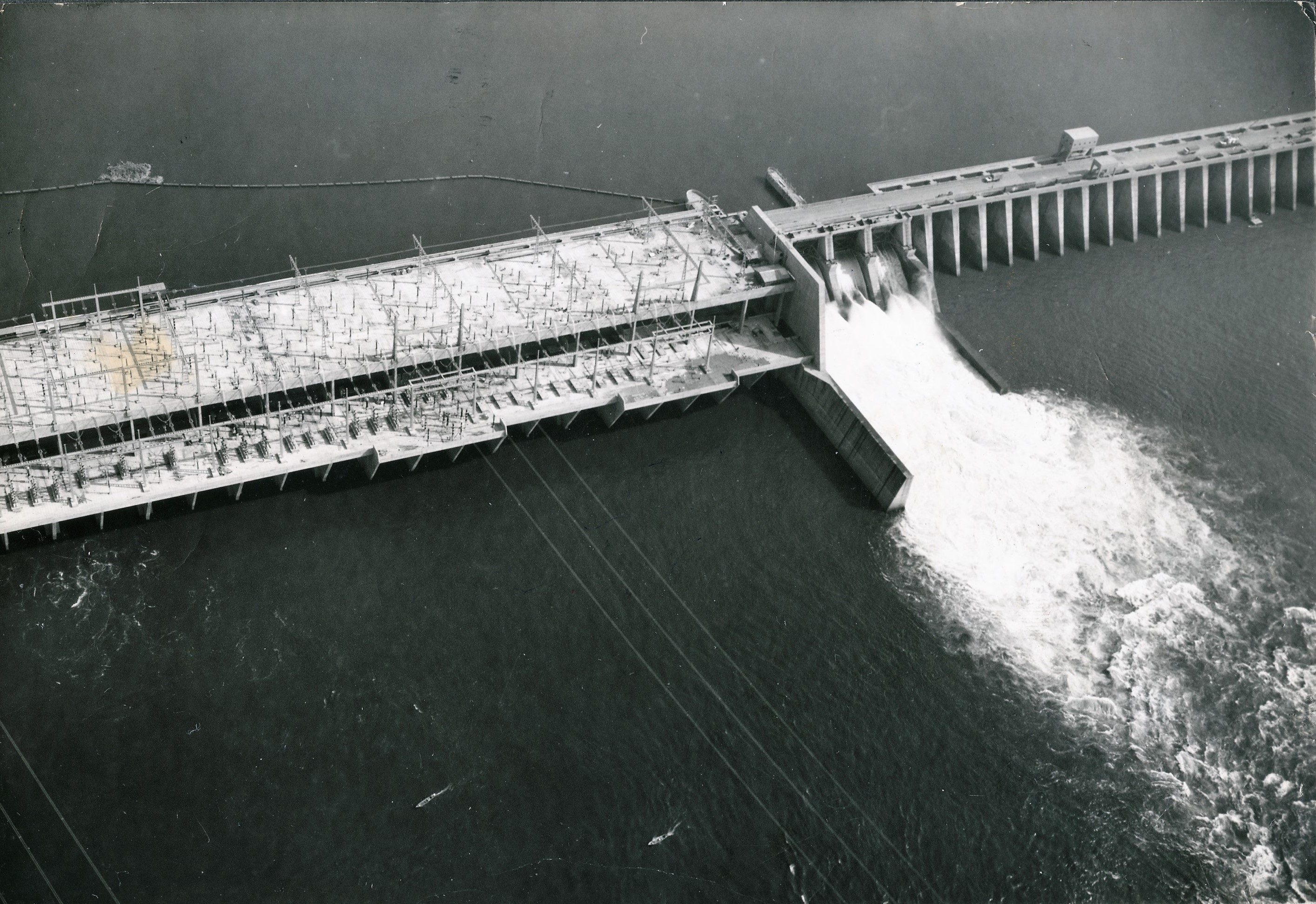 Fotografia do Fundo Correio da Manhã, sob a guarda do Arquivo Nacional.